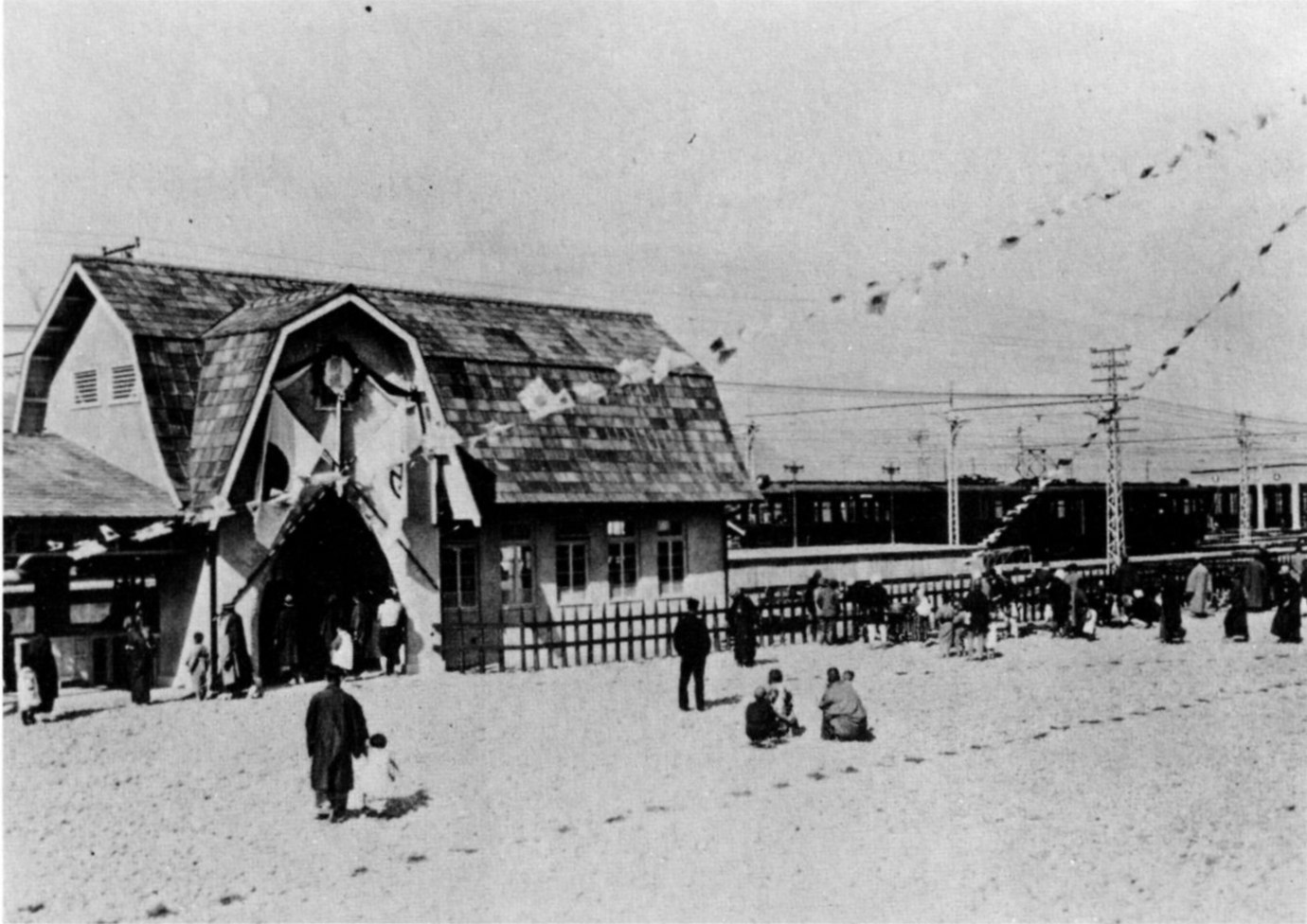 1928年(昭和3年)11月1日、開業当日の新京阪鉄道(現・阪急京都線)桂駅。現在の東口。祝い提灯や旗が飾られ、打ち上げ花火で祝意を表し、午前10時から桂停留場前広場で周辺の村の合同主催で祝賀園遊会が催された。11月2日の朝日新聞に記事が掲載されているという。